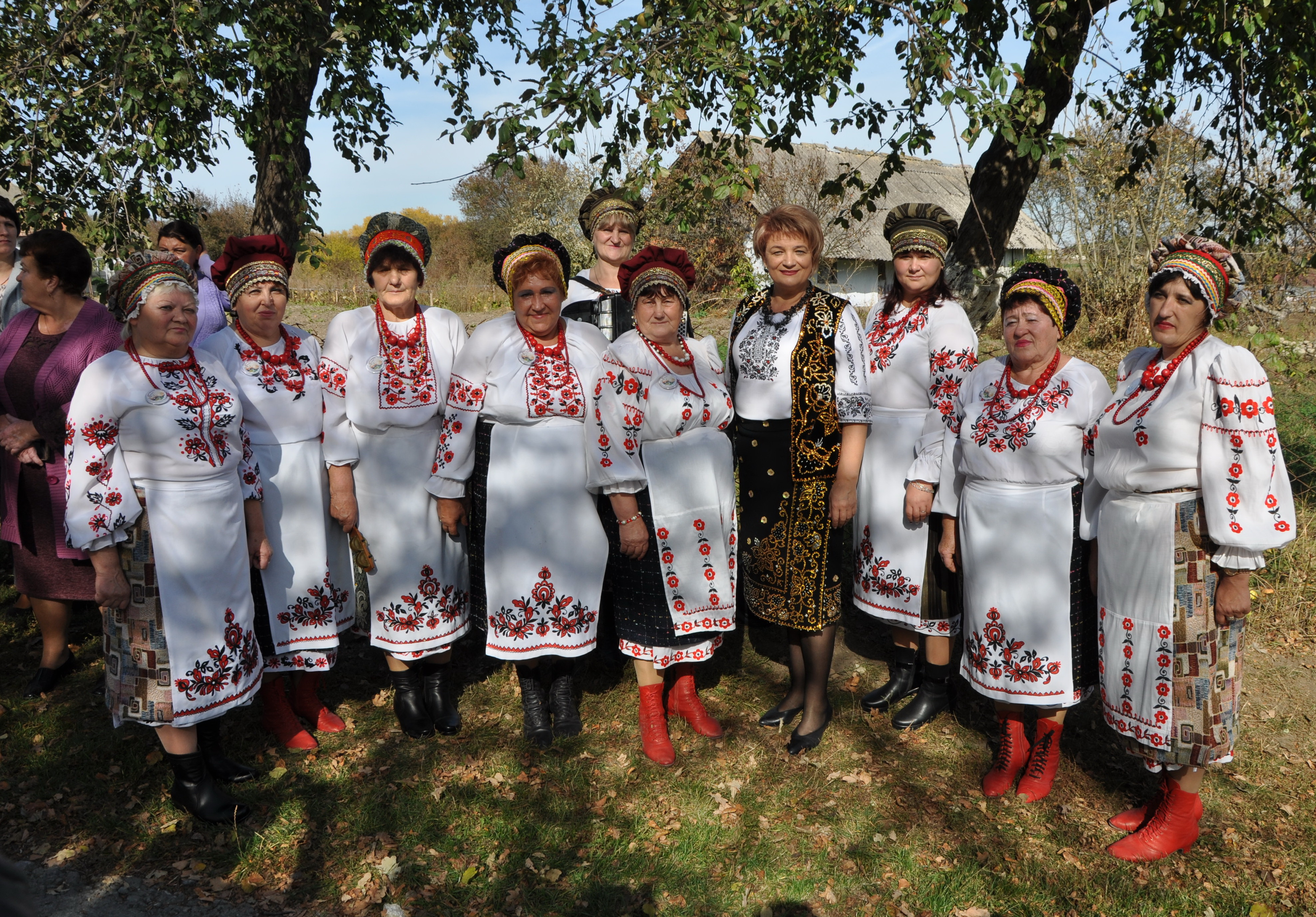 Фестиваль "Червона калина" в Шманьківцях.